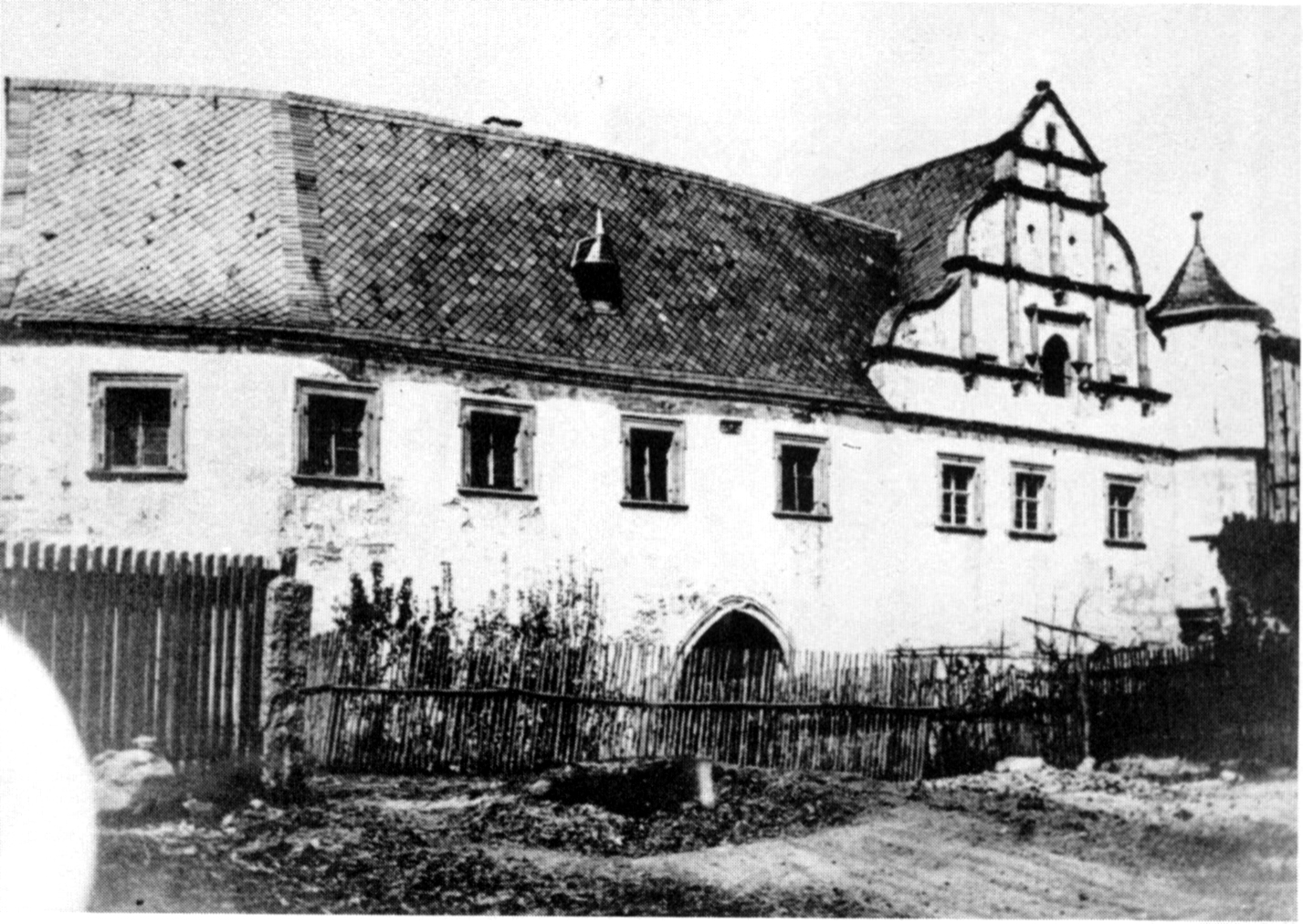 Die Burgkunstadter Altenburg, erbaut 1575, abgerissen 1895